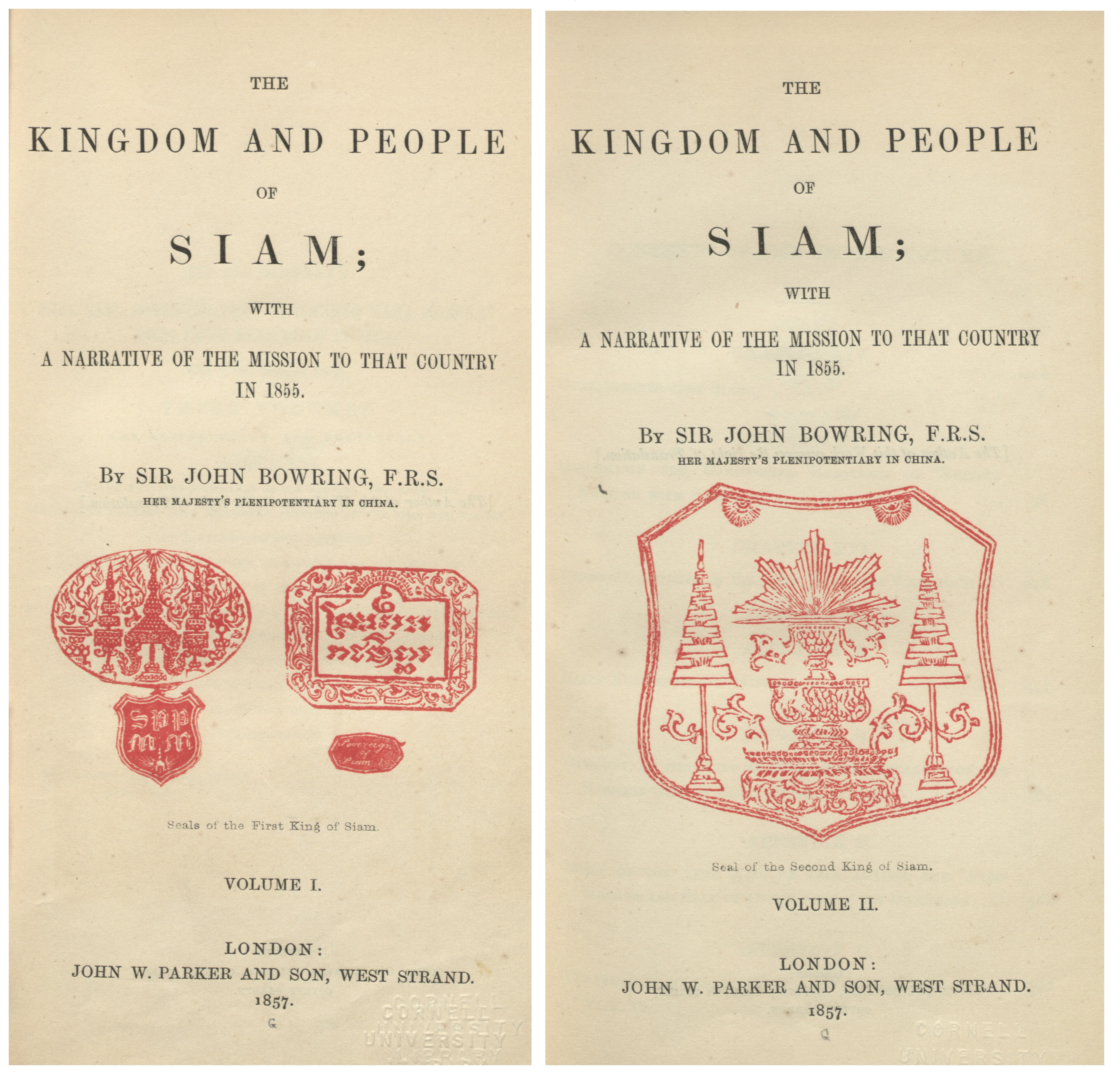 หน้าปกหนังสือราชอาณาจักรและราษฎรชาวสยาม ของ เซอร์จอห์น เบาริ่ง ตีพิมพ์เมื่อ ปี 1855 ณ กรุงลอนดอน